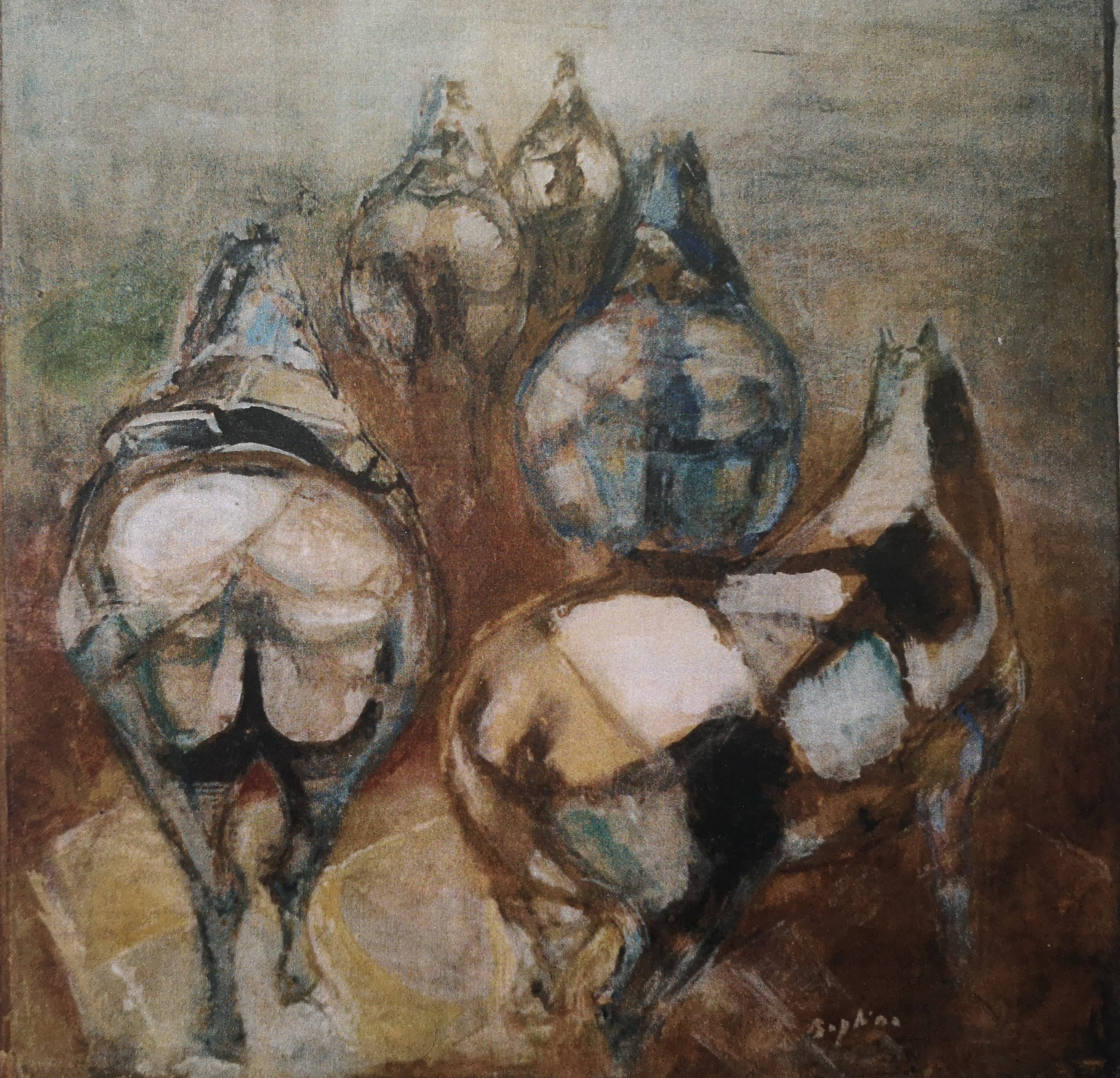 Billede af 5 heste set bagfra